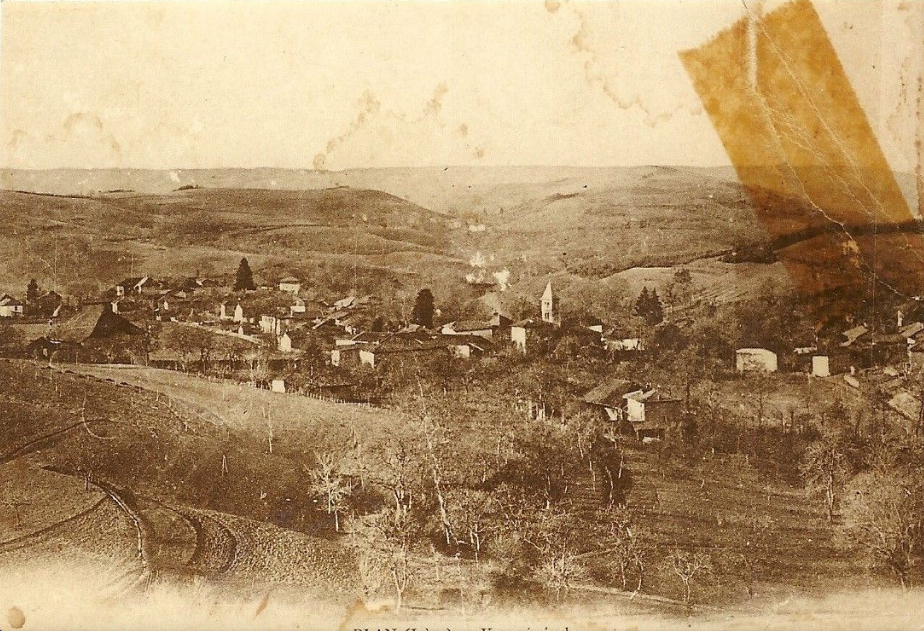 Plan (Isère) : vue générale, carte postale ancienne